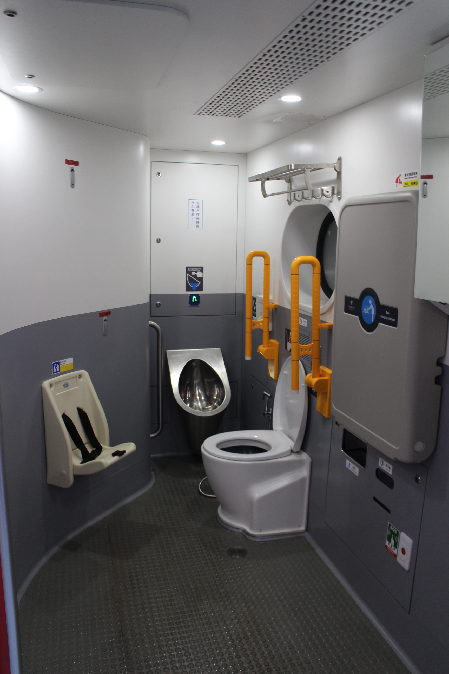 台湾鉄路管理局EMU500形電車 屏東仕様 トイレ